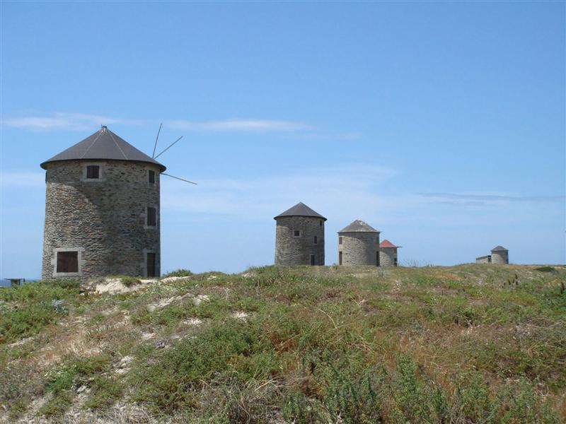 Moinhos nas dunas da Praia da Apúlia, freguesia de Apúlia, Esposende, Portugal. Author: Jose Goncalves